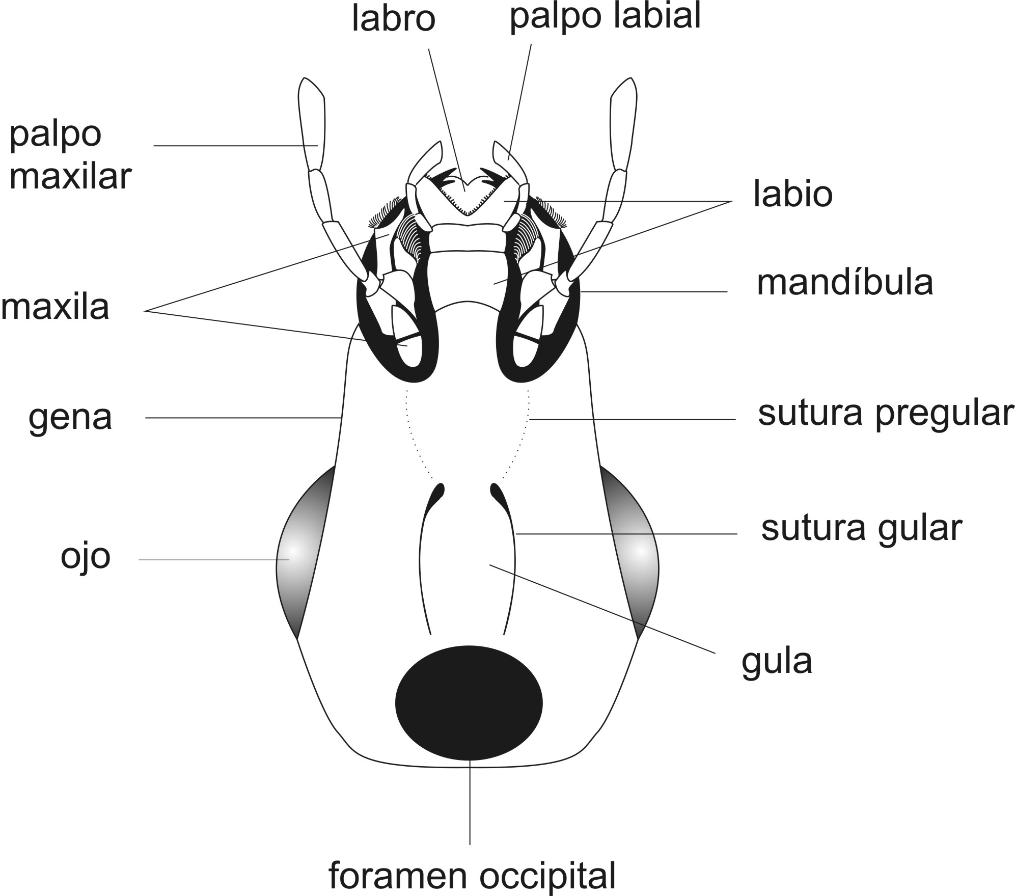 Morfología externa de la cabeza de un coleóptero en visión ventral